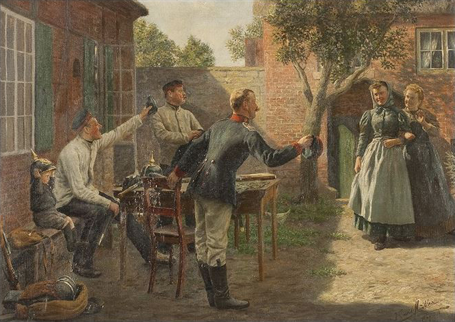 Die freudige Begrüßung , 1898 50,5 x 70 cm